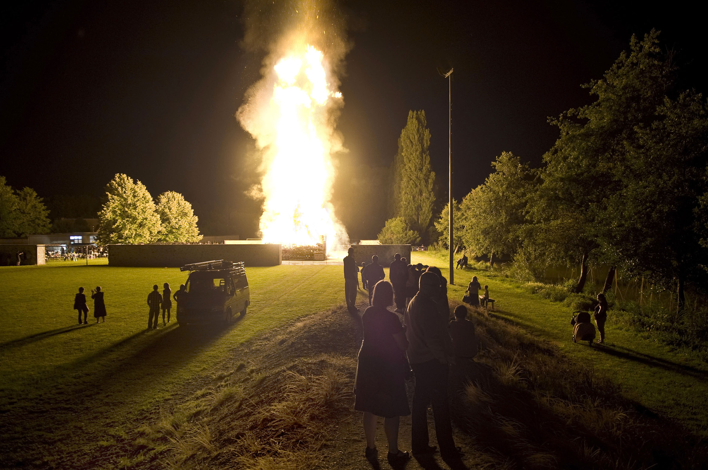 Fête de la Saint-Jean / Pont-sur-Seine (2011)